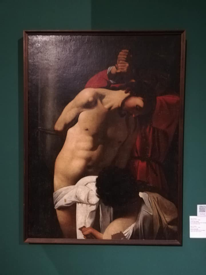 Cristo alla Colonna opera di Mario Minniti custodito nel Museo civico di Castello Ursino.